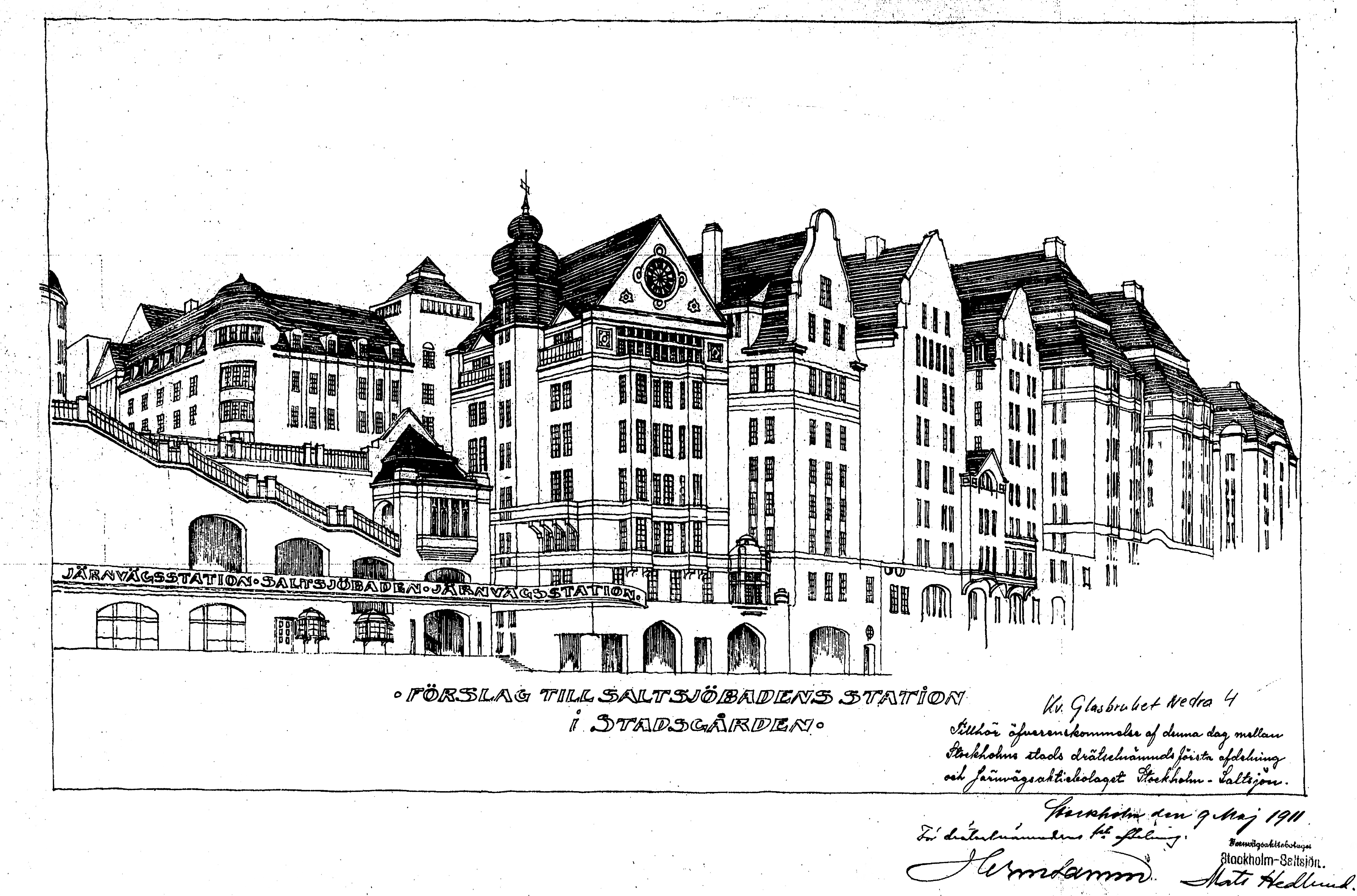 Saltsjöbanans stations hus vid Stadsgården, ritning. Drottsgården syns till höger. Byggnaderna däremellan uppfördes aldrig.